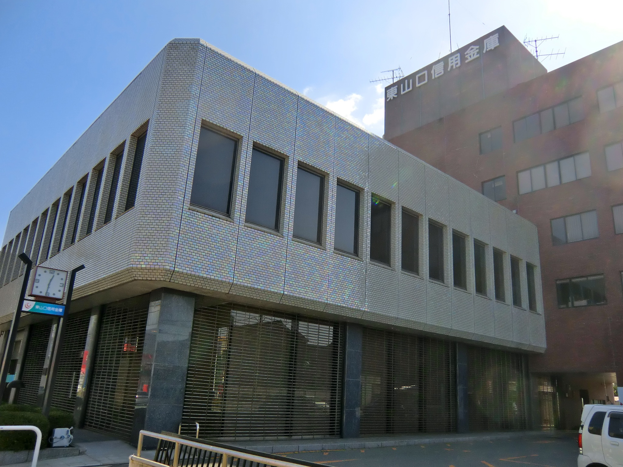 東山口信用金庫本店（防府市）の外観。旧防府信用金庫本店。